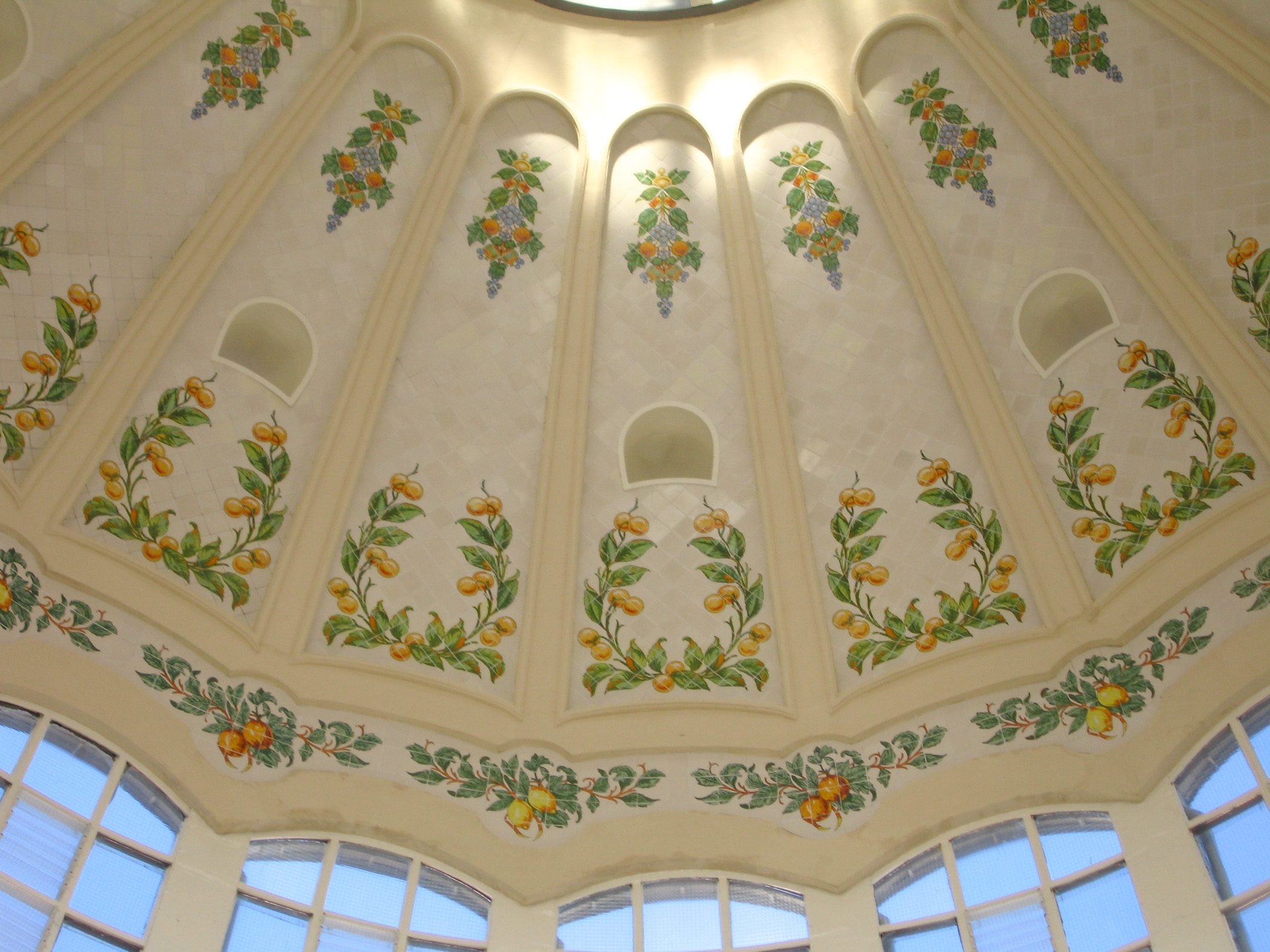 Detall de la cúpula del mercat central de València